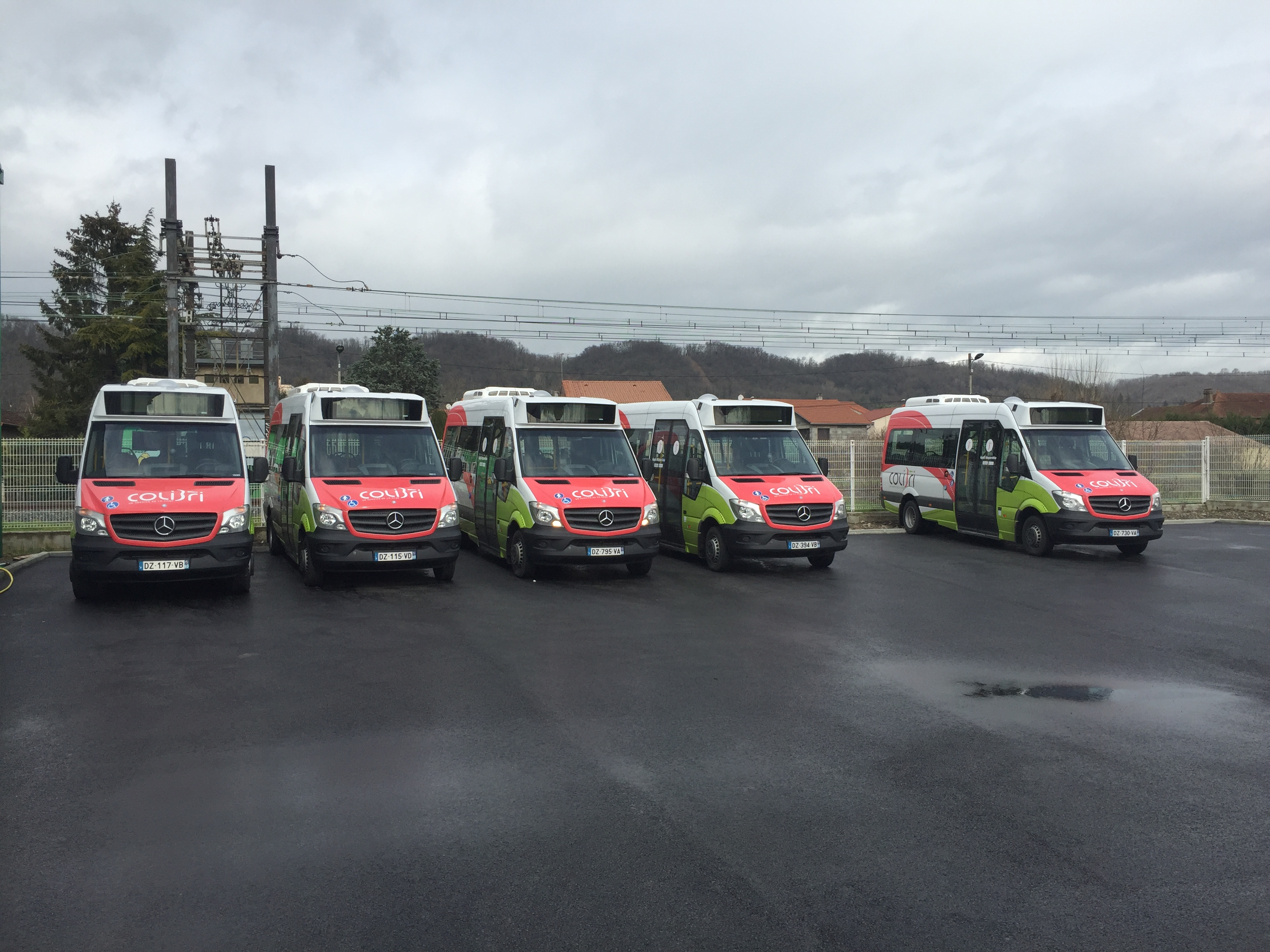 Bus Colibri au dépôt, rue de la traille, en mars 2016.